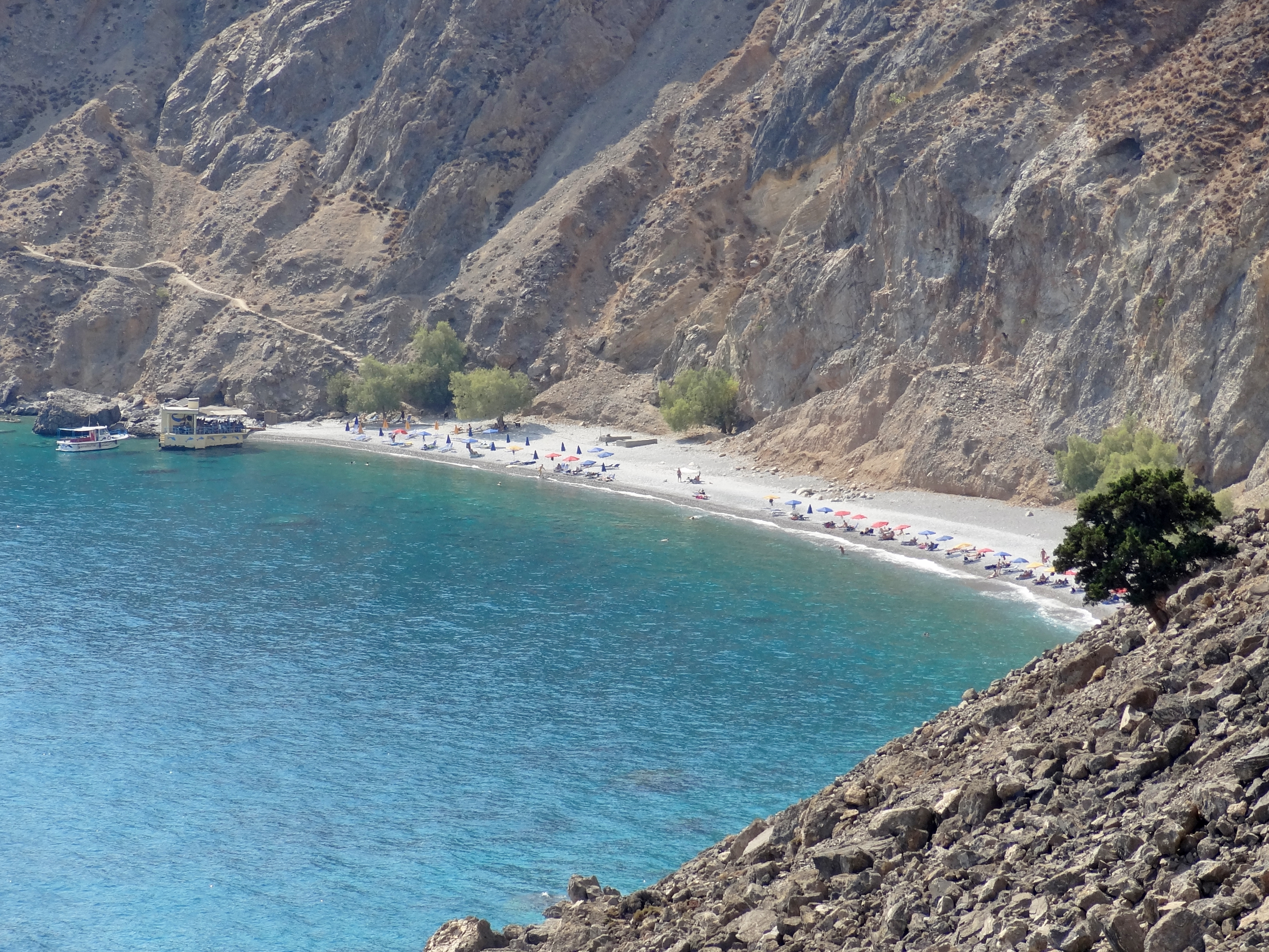 Süßwasserstrand (Παραλία Γλυκά Νερά Paralia Glyka Nera), Gemeinde Sfakia, Regionalbezirk Chania, Kreta, Griechenland